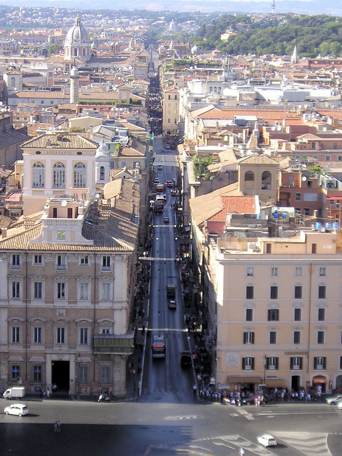 Via del Corso, Roma, on the left sideː Palazzo Bonaparte